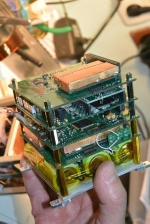 Підсистеми cупутника КПІ PolyITAN-2 в зборі